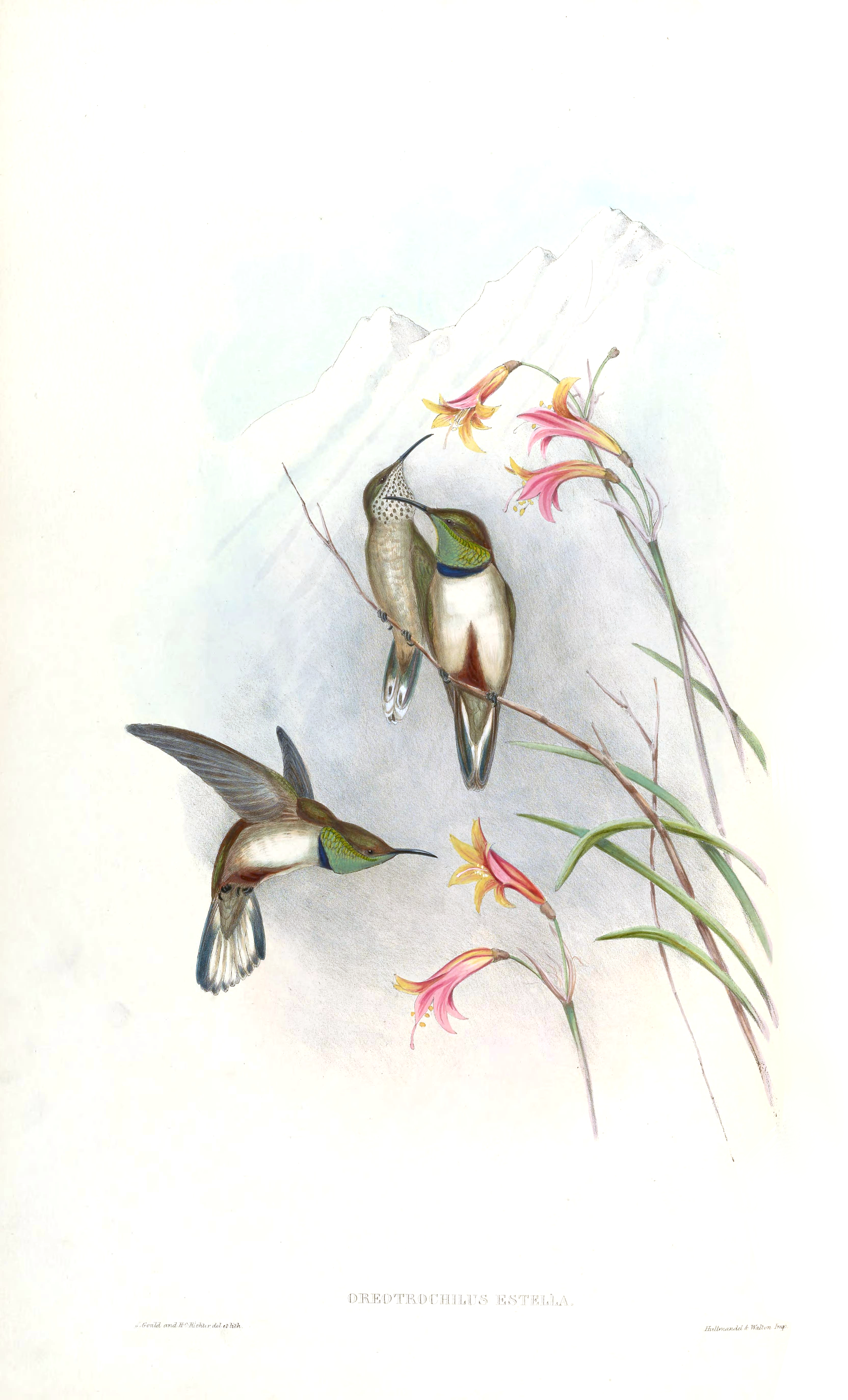 Estella's Hillstar (Oreotrochilus estella)